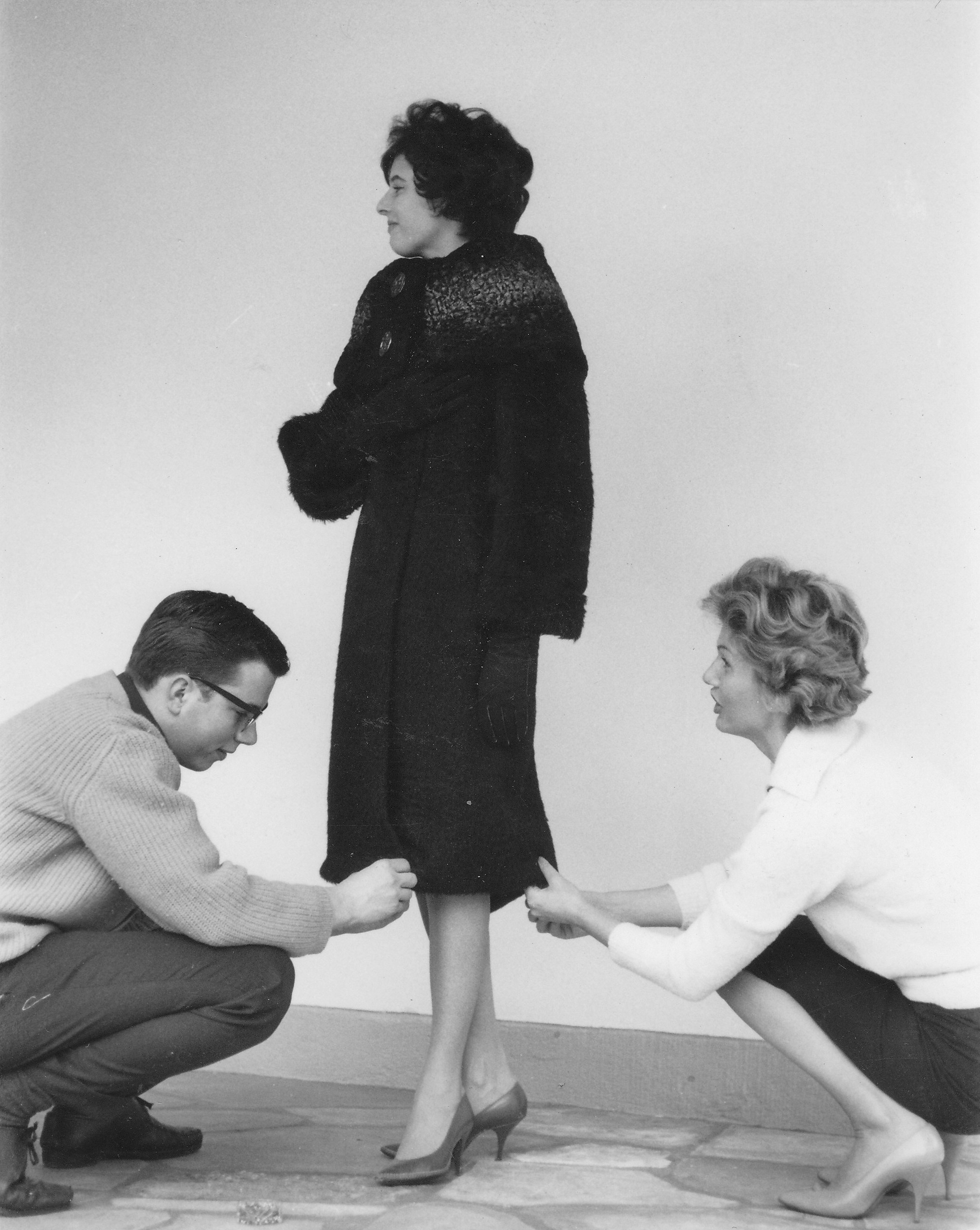 Mantel anpassen